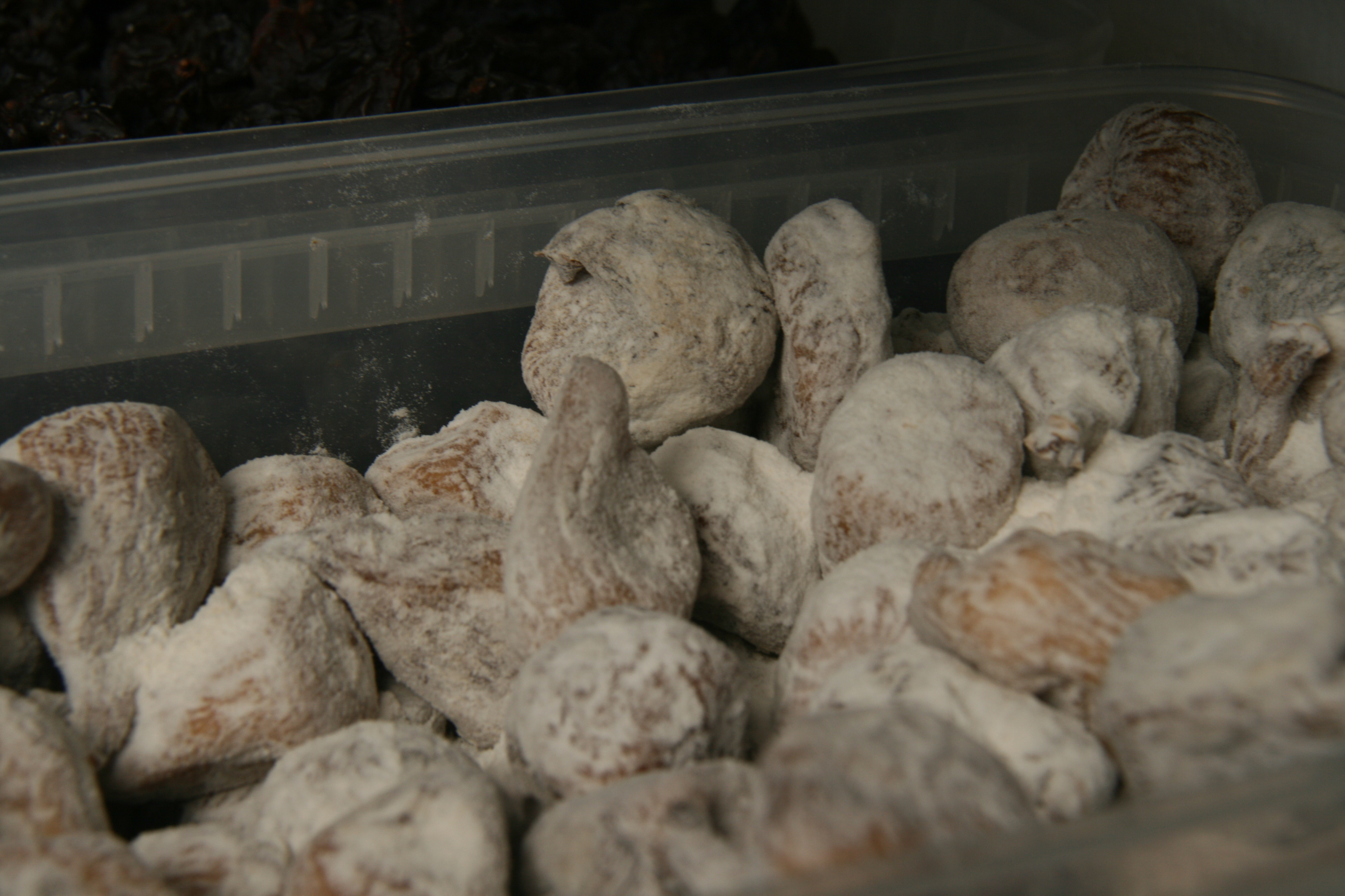 Higos secos